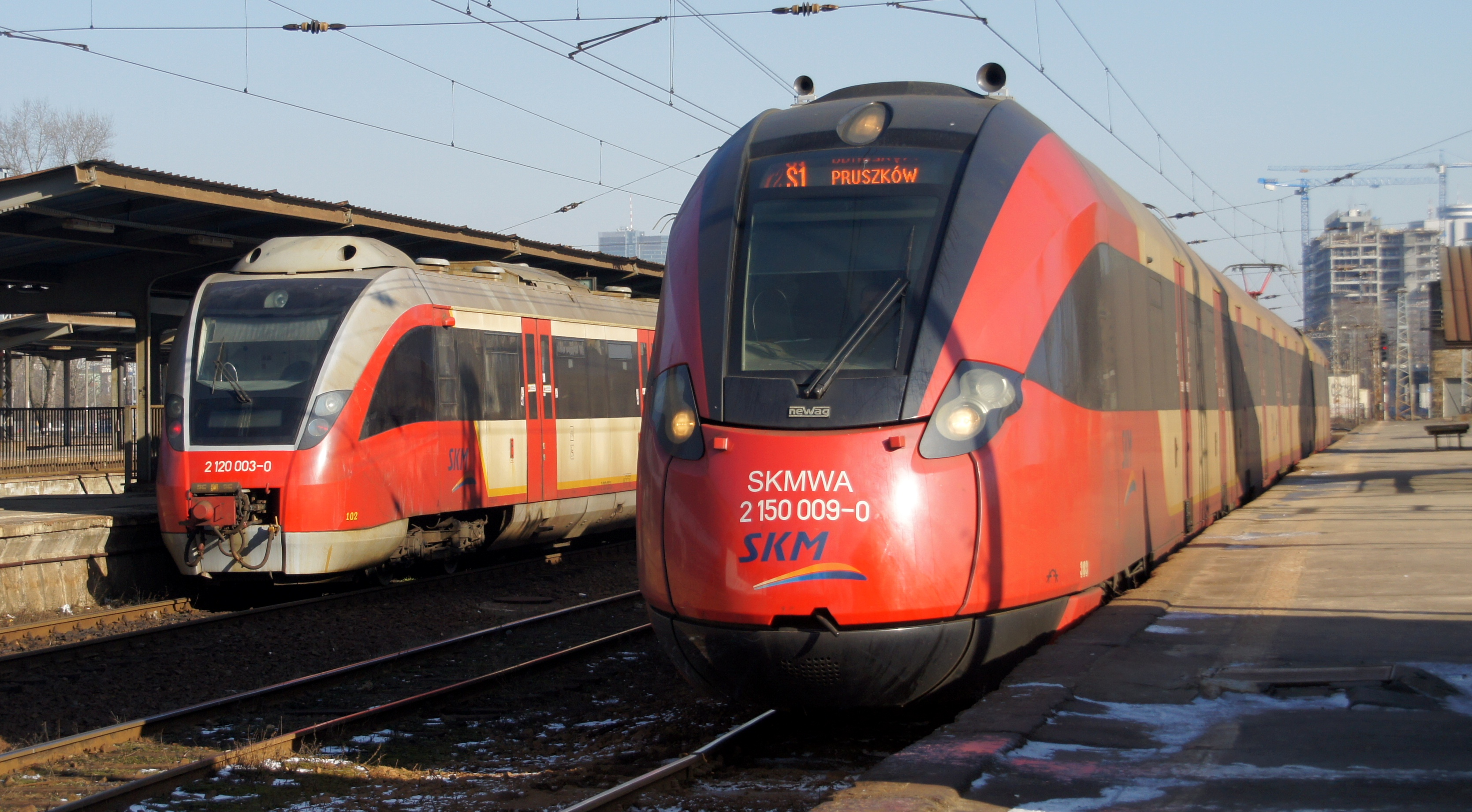 2 pociągi SKM Warszawa, na stacji Warszawa Zachodnia - po lewej (starszy) pociąg typu 14WE, po prawej (nowszy) pociąg typu 19WE